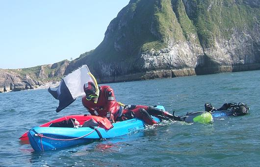 Kayak dive Little Orme